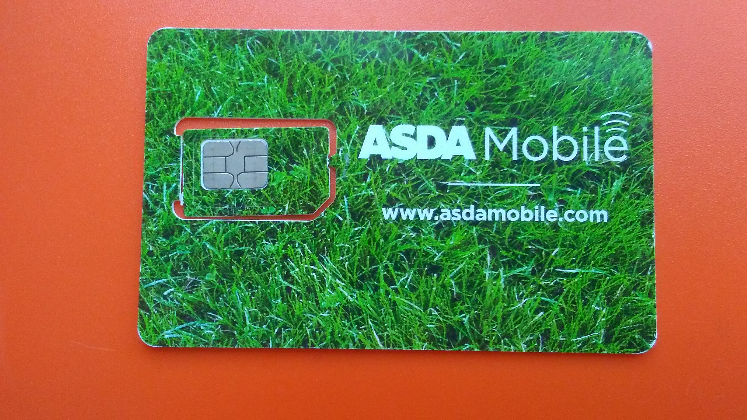 ASDA Mobile SIM card